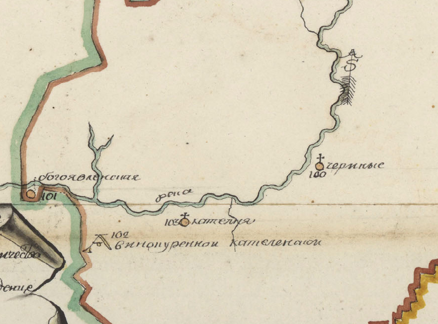 Топографическая карта Темниковского уезда 1787 года